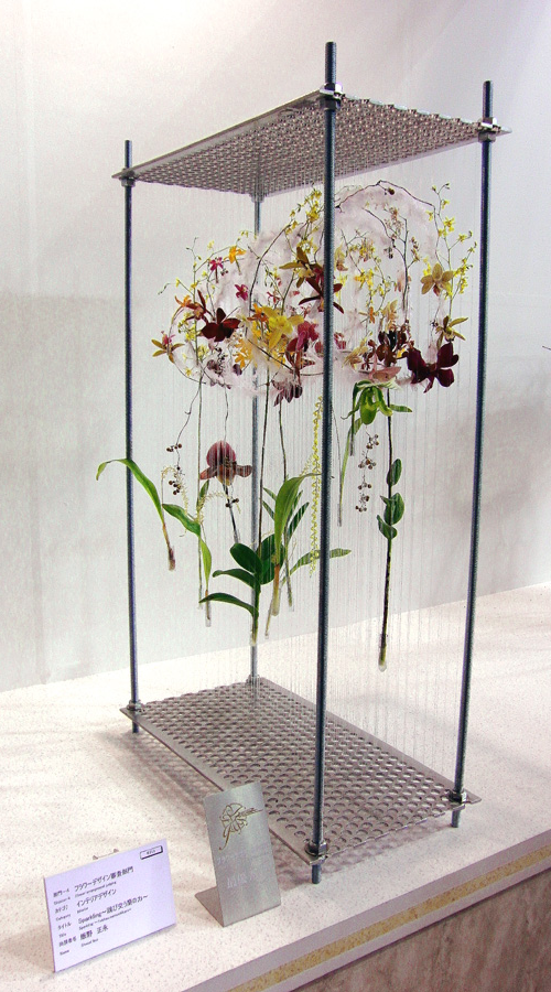 JGP2012【部門4】最優秀賞 「Sparkling」 ～跳び交う蘭の力～ 2012/02/26東京ドームにて撮影